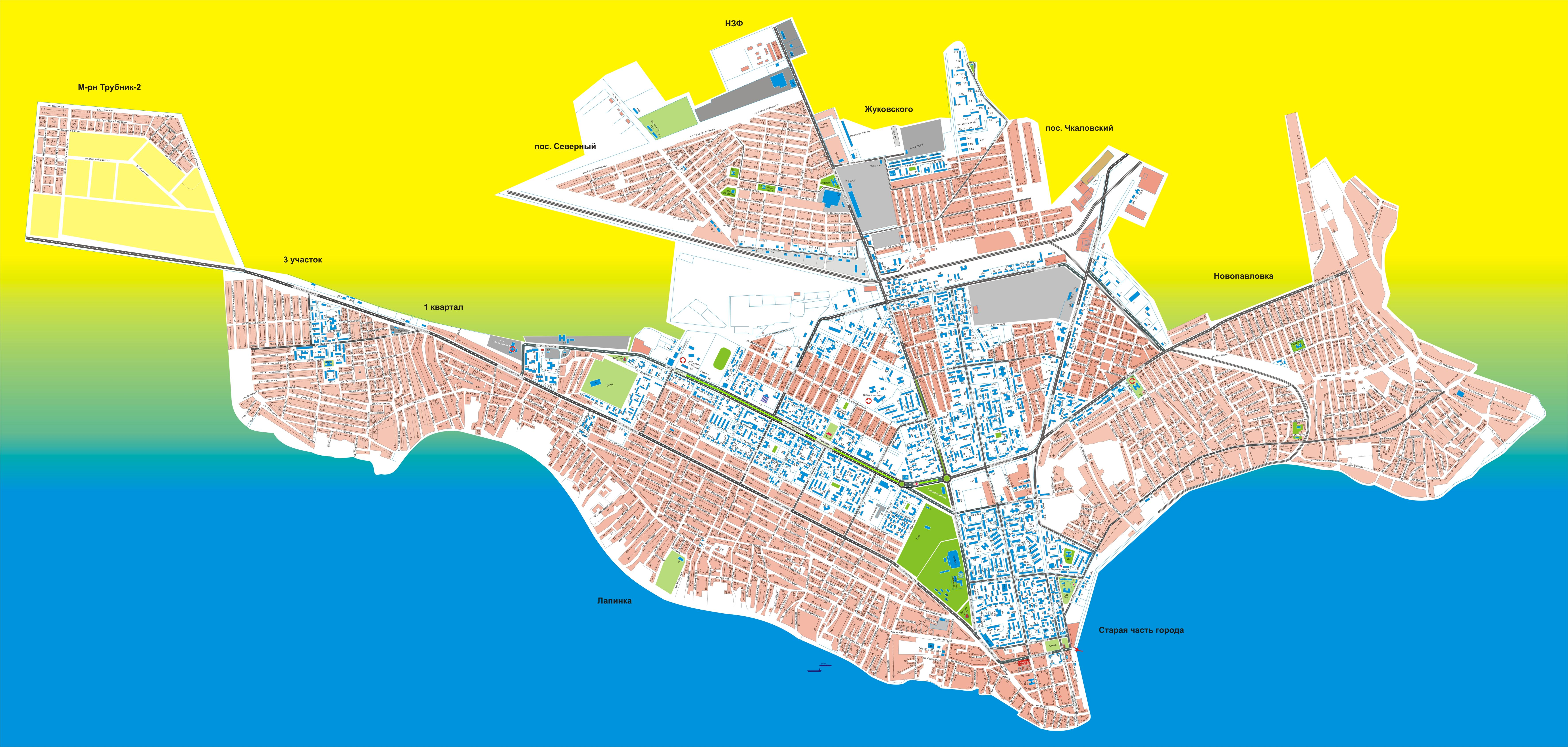 Карта города Никополь